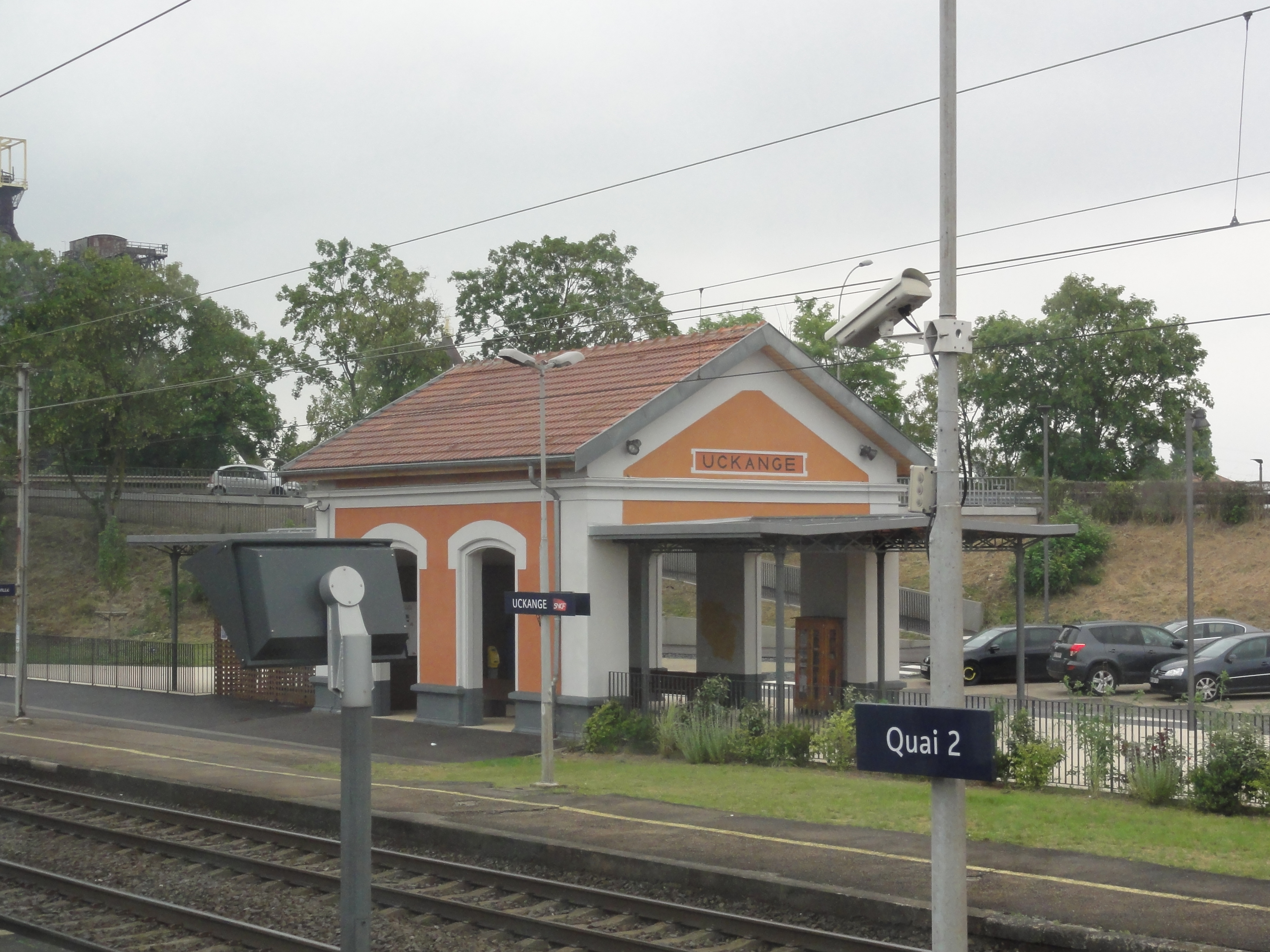 Uckange ( 57 - Moselle ) gare